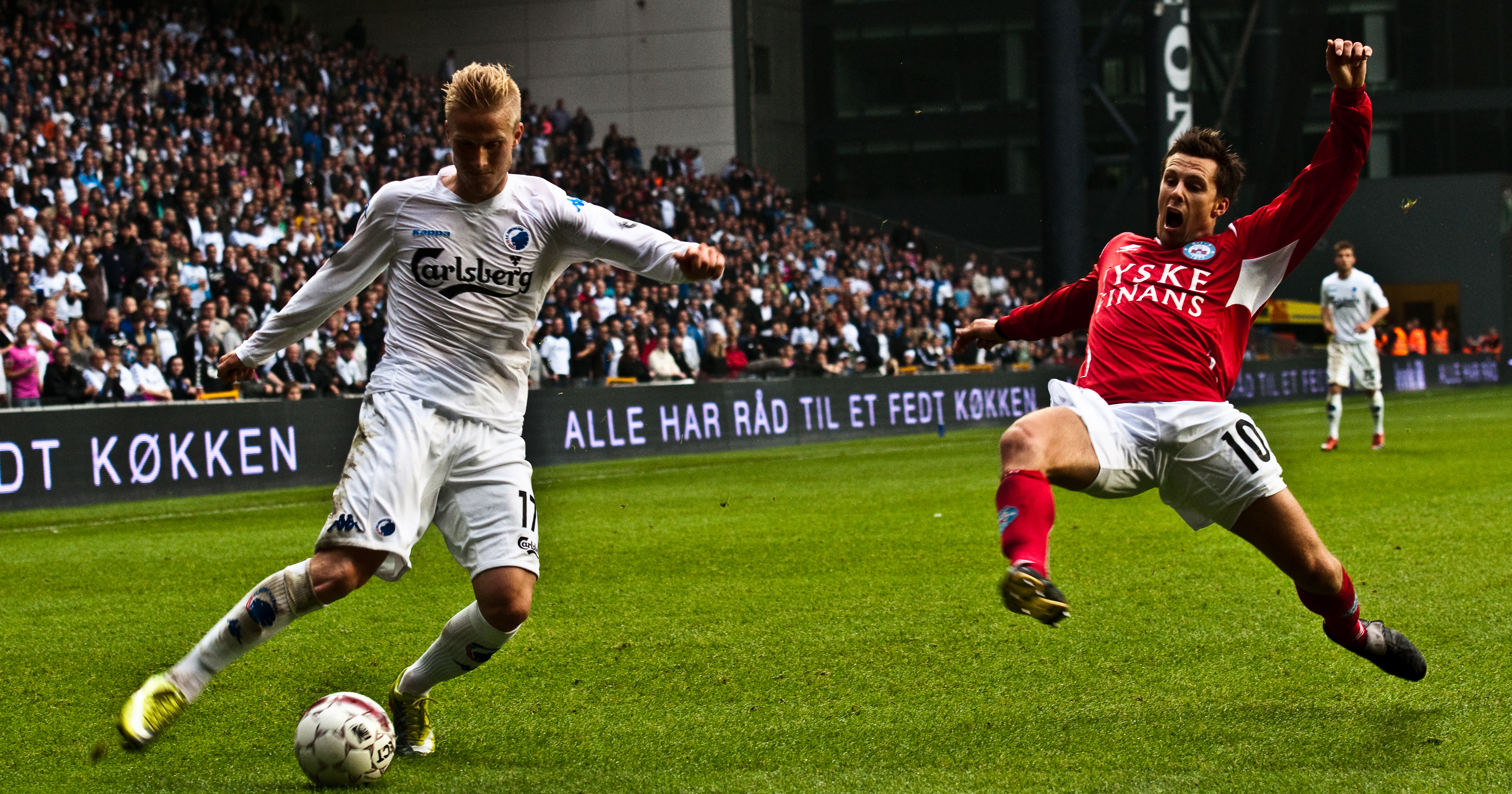 FCK vs. Silkeborg